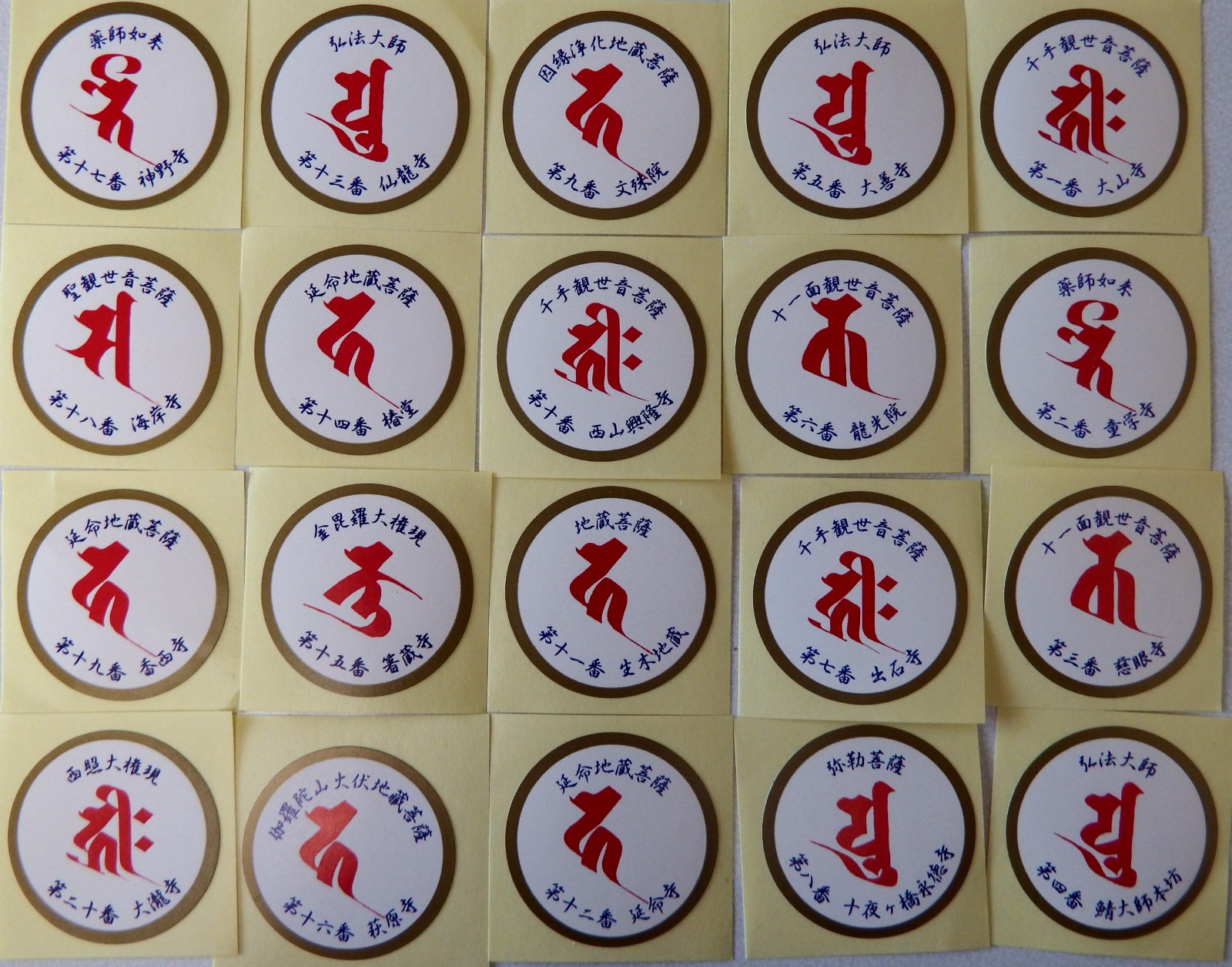 四国別格２０霊場の梵字シール